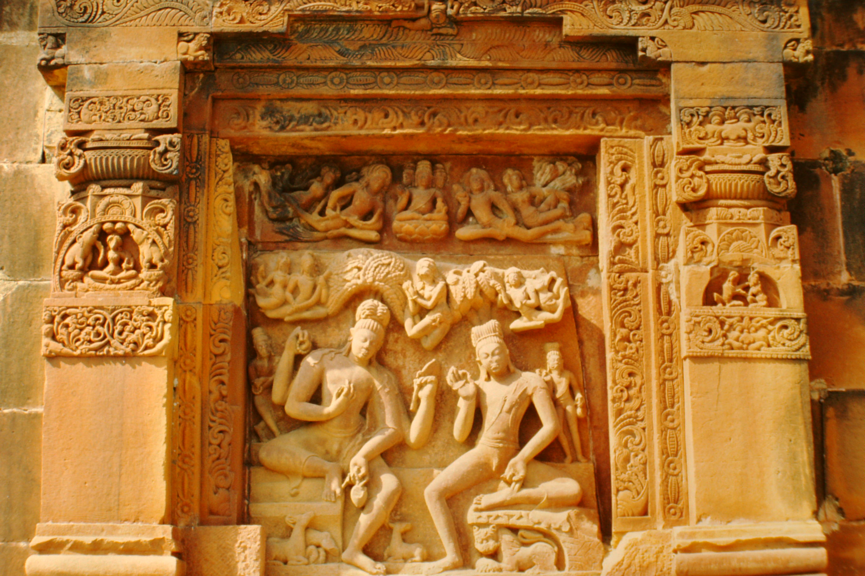 Deogarh, Dasavatara-Tempel, Nara Narayana